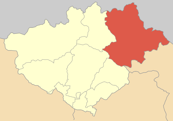 Locator map of Paranesti municipality (Δήμος Παρανεστίου) in Drama prefecture (Νομός Δράμας) in Greece.